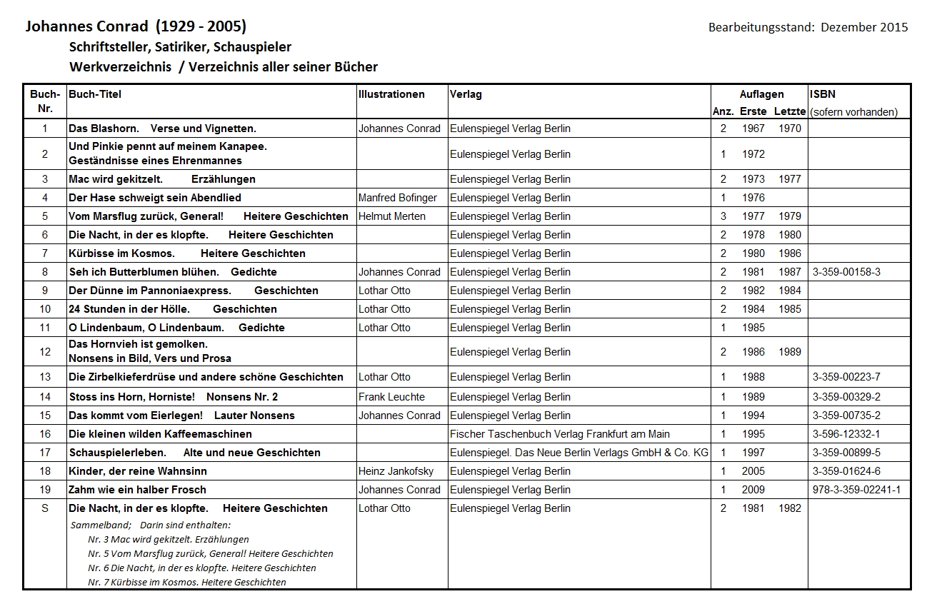 Johannes Conrad, Satiriker, Werkverzeichnis (Bücher)